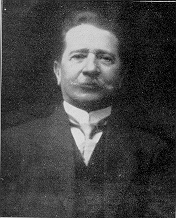 Anton Rzehak